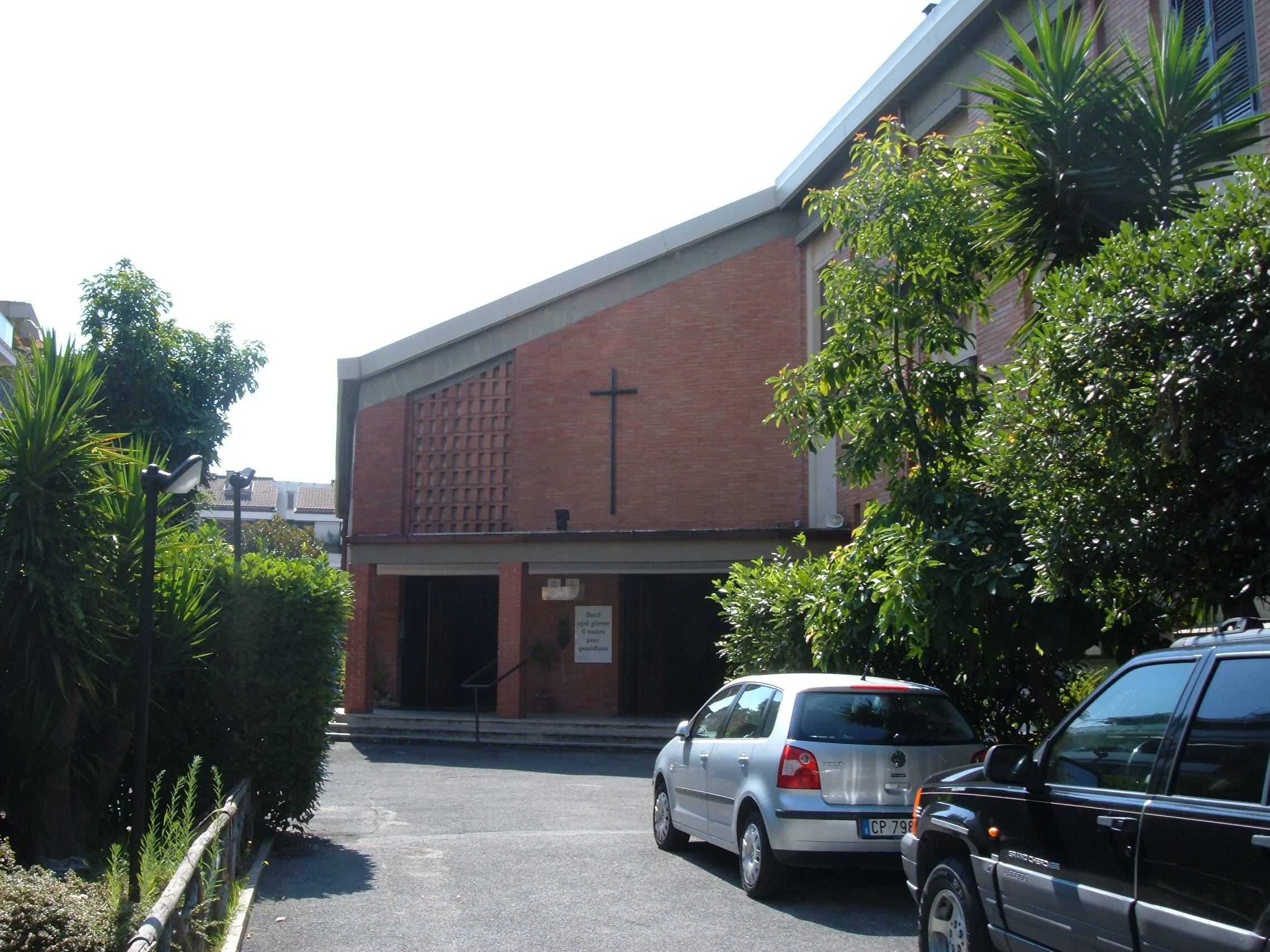 Chiesa parrocchiale del Preziosissimo Sangue di Gesù, a Roma, in via Flaminia, nel quartiere Tor di Quinto.